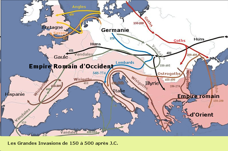 Trajets de différents peuples lors des Invasions barbares entre 150 et 500.